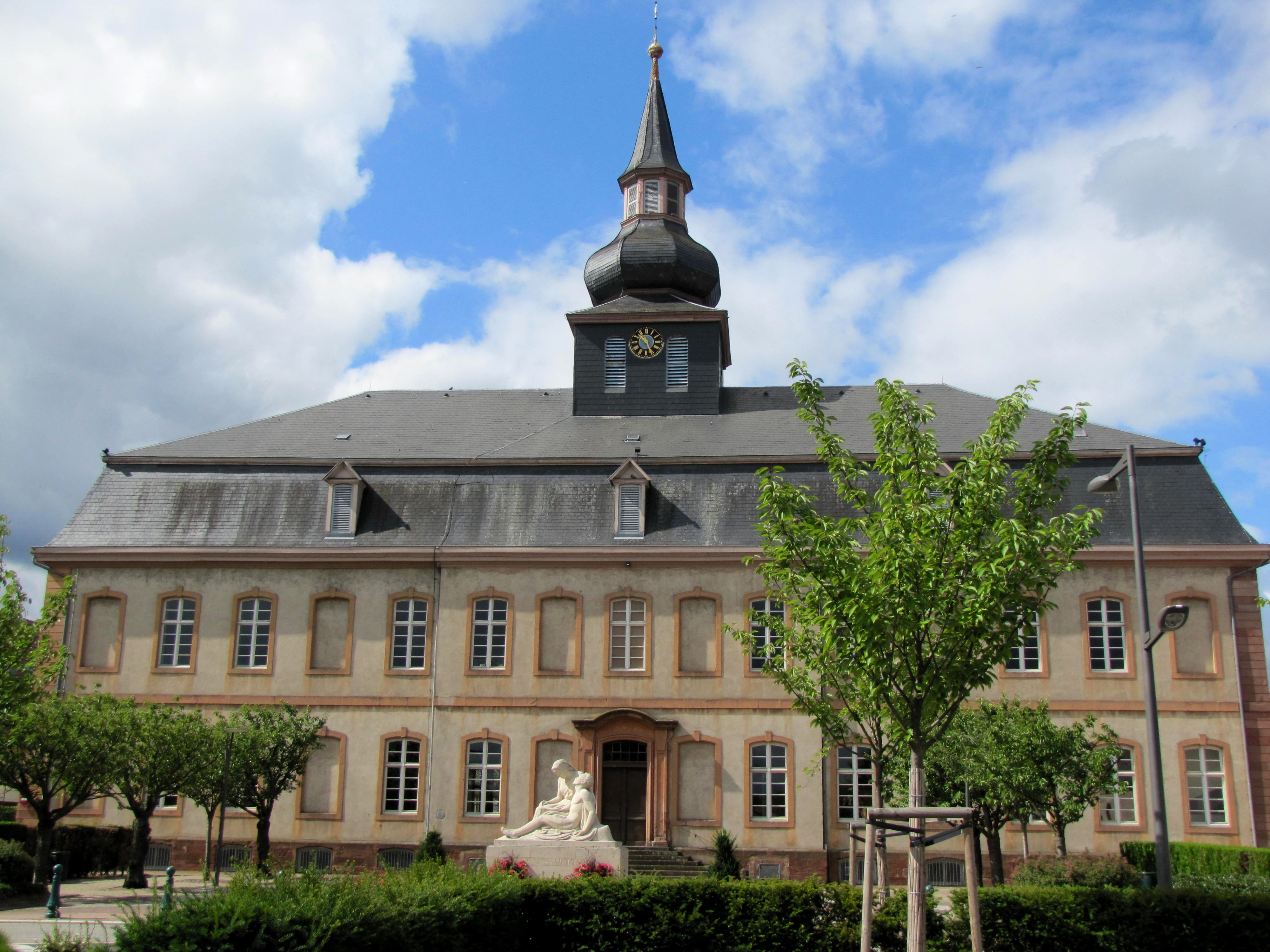 Alsace, Bas-Rhin, Brumath, Ancien château de Hanau-Lichtenberg aujourd'hui église protestante.